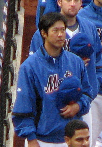 Ken Takahashi